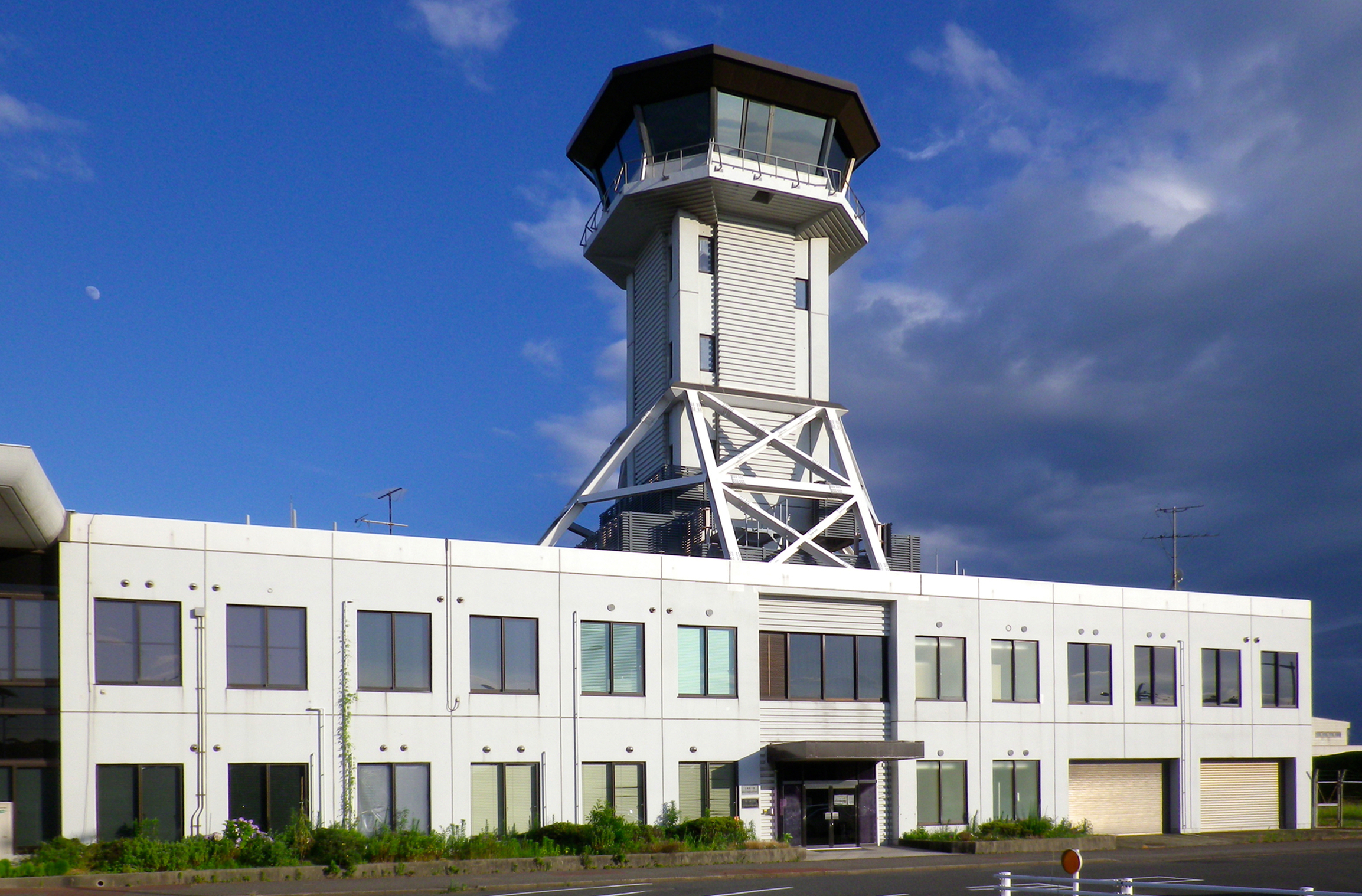 山口県宇部市。山口宇部空港管制塔。2011年7月11日撮影。